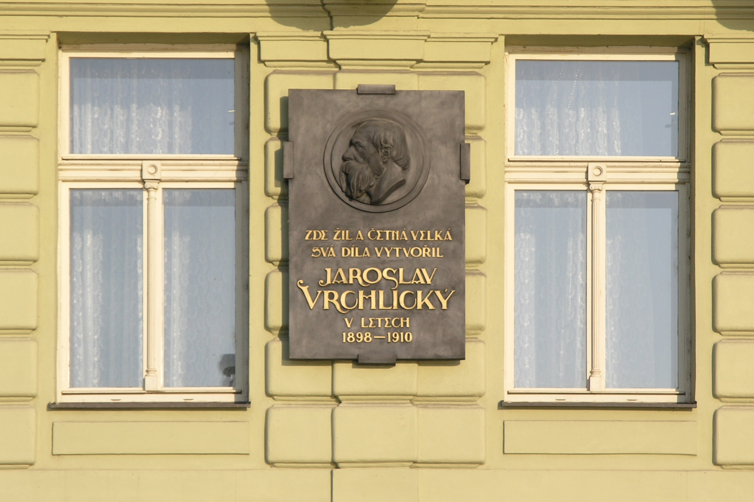 Praha, Nové Město - Rašínovo nábřeží